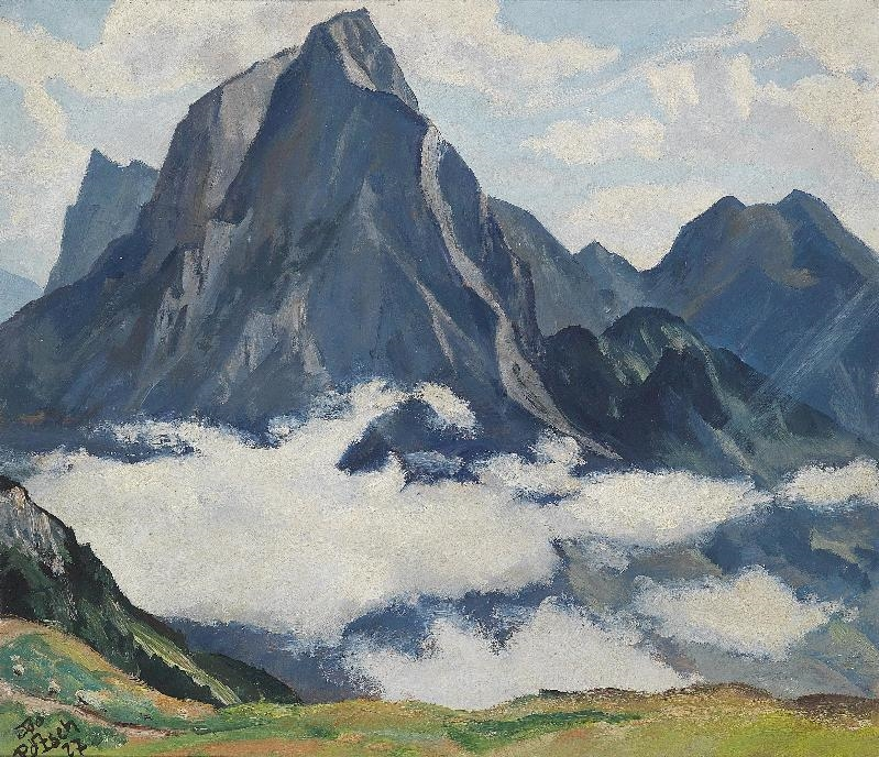 Der Ödstein